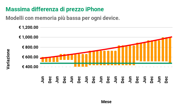 Il andamento prezzi del iPhone in Italia dal iPhone 3G al iPhone 8 rilevato da riCompro Srl pubblicato sotto Licenza Open Source di MWV.